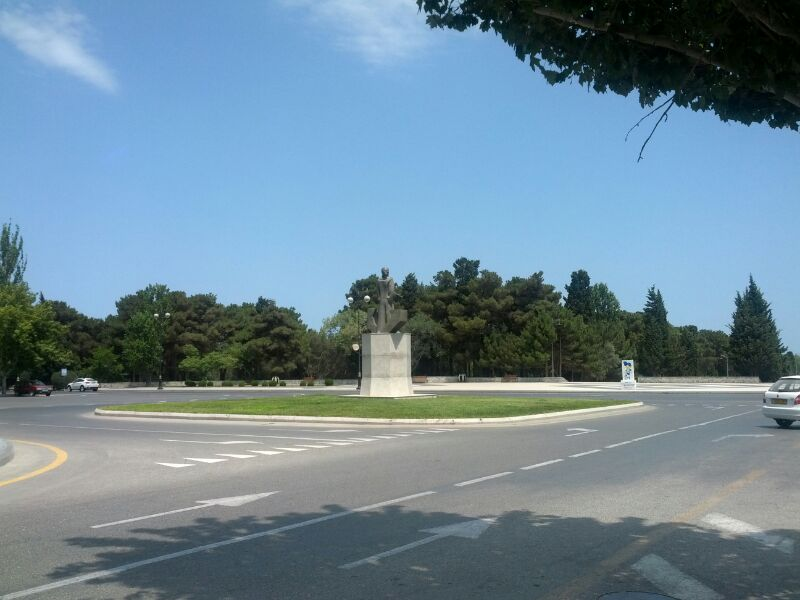 Nəsimi adına Mədəniyyət və İstirahət parkı 1967-ci ildə Azərbaycan SSR Mədəniyyət Nazirliyinin 16 mart tarixli 64 saylı əmrinə əsasən mədəniyyət və istirahət parkı yaradıldı. 23 hektar dənizkənarı sahəni əhatə edən ərazidə küləyə, quraqlığa davamlığı olan 39 növ ağac düzüldü. Şəhər əhalisinin sağlamlığında parkın yaşıl ərazisi ilə yanaşı, çimərlik zonası da əhəmiyyətli rol oynayır. İldən-ilə genişlənən, gözəlləşən parka 17 avqust 1978-ci ildə dahi Azərbaycan şairi Nəsiminin adı verilmişdir. Elə həmin ildə V.Nəzirov və A.Quliyevin müəllifi olduğu В«Sülh göyərçiniВ» abidəsinin qoyulması parkı daha da gözəlləşdirdi. 1981-ci ildə В«Yay estradasıВ»nın açılışı, В«Rəqs meydançasıВ»nın təşkili, kafelər, müxtəlif qurğulu yelləncəklər, mexaniki attraksionlar şəhər əhalisinin mədəni istirahəti üçün əvəzsizdir. Nəsimi adına mədəniyyət və istirahət parkı yaz-yay mövsümündə mədəni-kütləvi tədbirlərin keçirilməsi üçün əsas mərkəzdir. Ağır faciələrə sinə gərmiş, mətinləşmiş Sumqayıtın yüzlərlə şəhid balasının son məkanı, şəhər əhalisinin ziyarətgahına çevrilən вЂњŞəhidlər xiyabanıвЂќ parkın şərq hissəsində yerləşir. 20 Yanvar şəhidlərinə həsr edilmiş abidə (1991-ci il) və вЂњUlduzlarвЂќ abidəsi (1999-cu il) sumqayıtlıları tarixi unutmamağa çağırır. Yuxarıda qeyd olunan heykəltəraşlıq nümunələrinin müəllifi, şəhərin baş rəssamı Vaqif Nəzirov, rəssam Aqil Quliyevlə birgə 7.10.2003-ci il tarixdə dahi Azərbaycan şairi İ.Nəsiminin abidəsi üçün Xəzərin sahili və yaşıllığa qərq olmuş parkın görkəmli mənzərəsinin ovuc içi kimi göründüyü yüksəklikdə ünvan seçdilər. Sumqayıtın əsas magistral yolu olan Səməd Vurğun küçəsindən tutmuş Xəzərin ləpədöyəninə qədər ərazini əhatə edən parkın hal-hazırda ümumi sahəsi 80-hektardır. Azərbaycan Respublikası Nazirlər Kabinetinin 2.08.2001-ci il tarixli 132 saylı qərarına əsasən, İ.Nəsimi adına mədəniyyət və istirahət parkı ölkə əhəmiyyətli tarix və mədəniyyət abidələri siyahısına daxil edilmişdir.